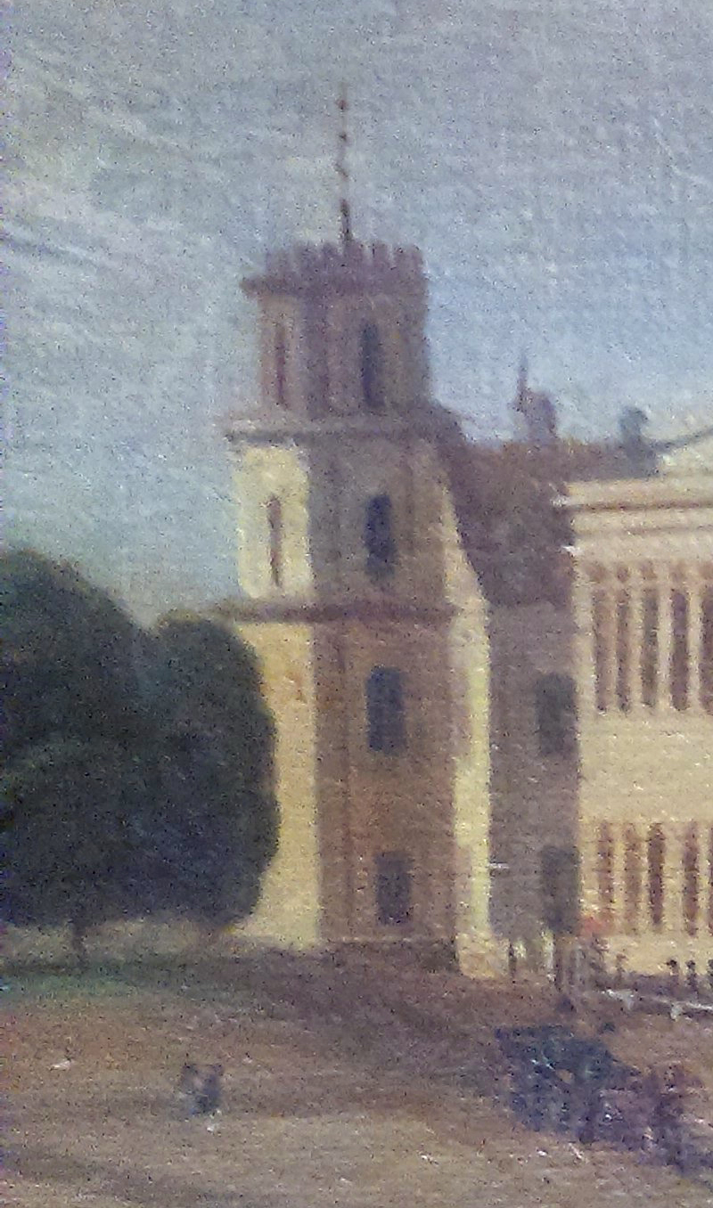 Беларуская (тарашкевіца): Берасьце (Bieraście), пляц Рынак (plac Rynak). Касьцёл Найсьвяцейшай Тройцы пры кляштары аўгустынаў